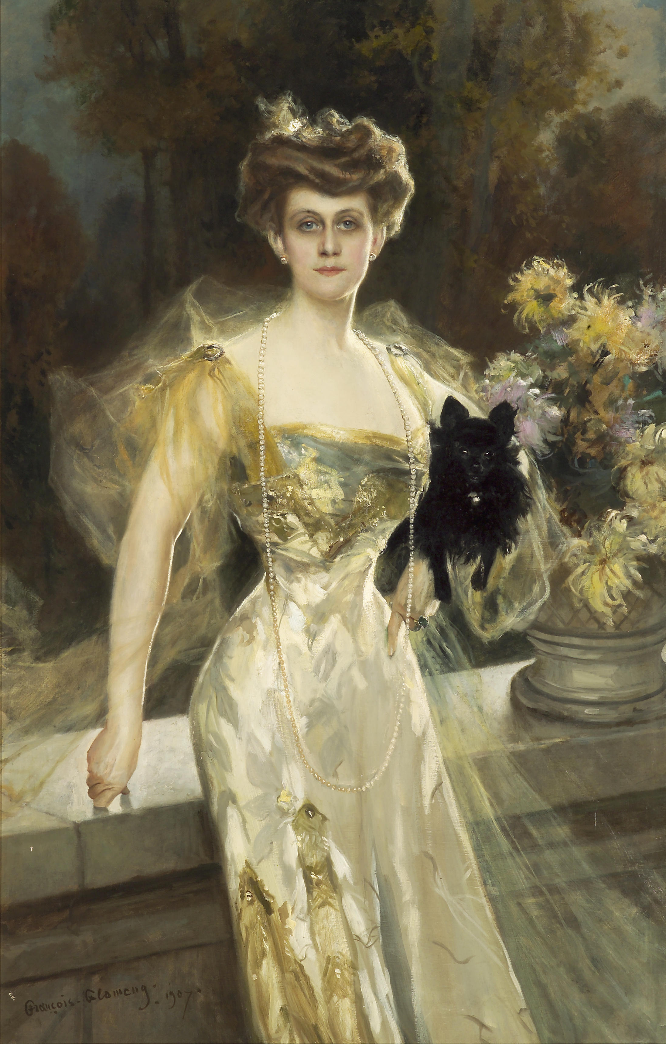 Hélène Thyra Seillière est une femme de lettres française. Elle est la fille illégitime du baron Raymond Seillière et d'une mère polonaise, Hélène Orzegowska. Elle est née à Londres le 10 mai 1880 et morte à Paris, le 2 mai 1973. Thyra Seillière est l'épouse de Henri Émile Anatole Menier, industriel et propriétaire du château de Chenonceau, mariés à Paris dans le 16ème arrondissement, le 11 juillet 1911.